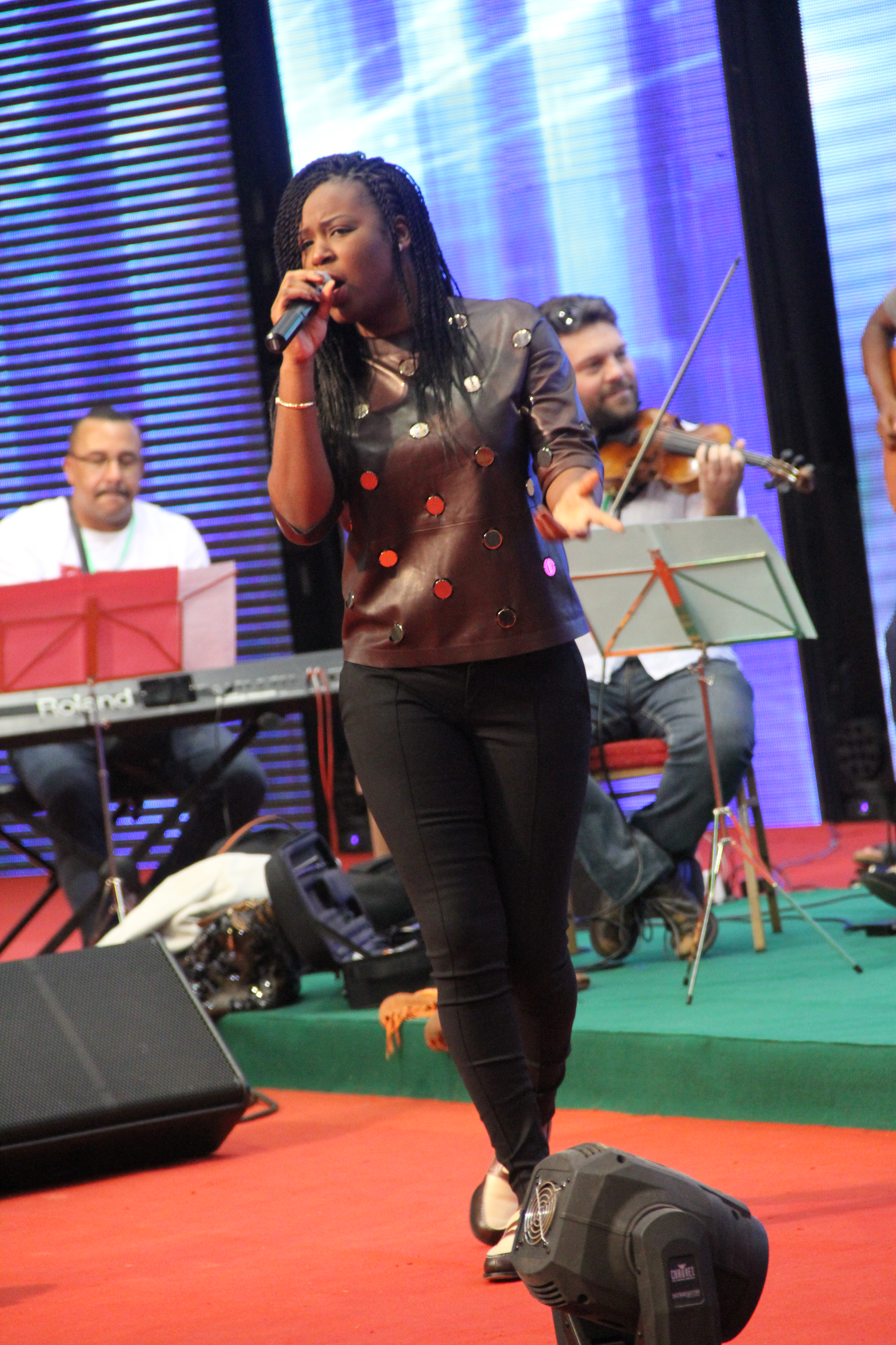 La chanteuse camerounaise Charlotte Dipanda à la veille du tirage au sort de la coupe d'Afrique des nations féminines au Palais des sports de Yaoundé